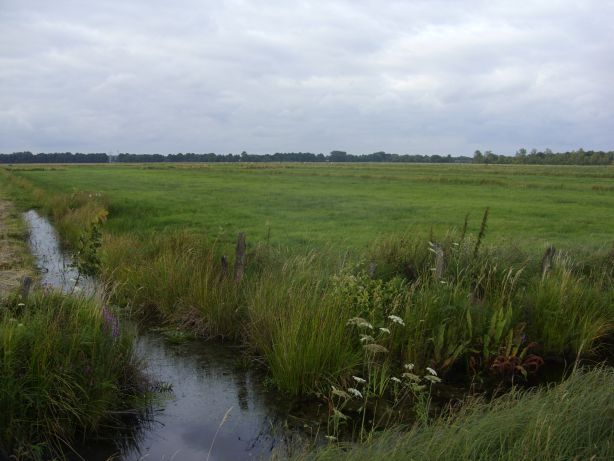 Naturschutzgebiet „Westliches Hollerland (Leherfeld)“